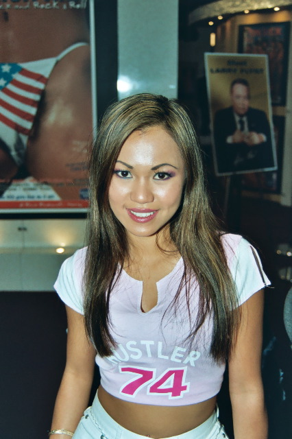 Sabrine Maui